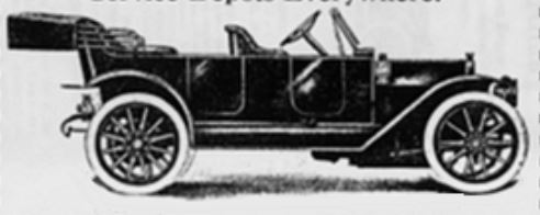 1912 Brockville-Atlas 40 HP Model A 7-passenger Touring. A Canada-built car with Atlas engine.